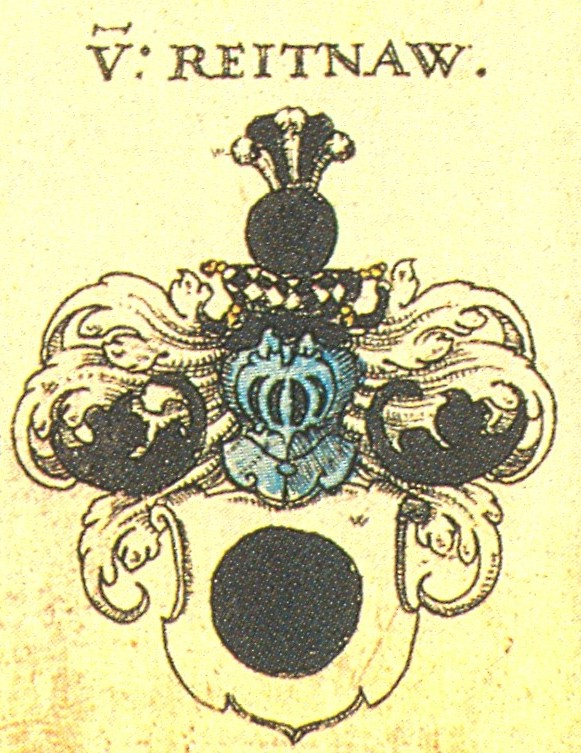 Ritterschaft und Adel in Schwaben von Reitnaw